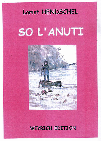 Walon: Coviete pordjetrece di So l' anuti